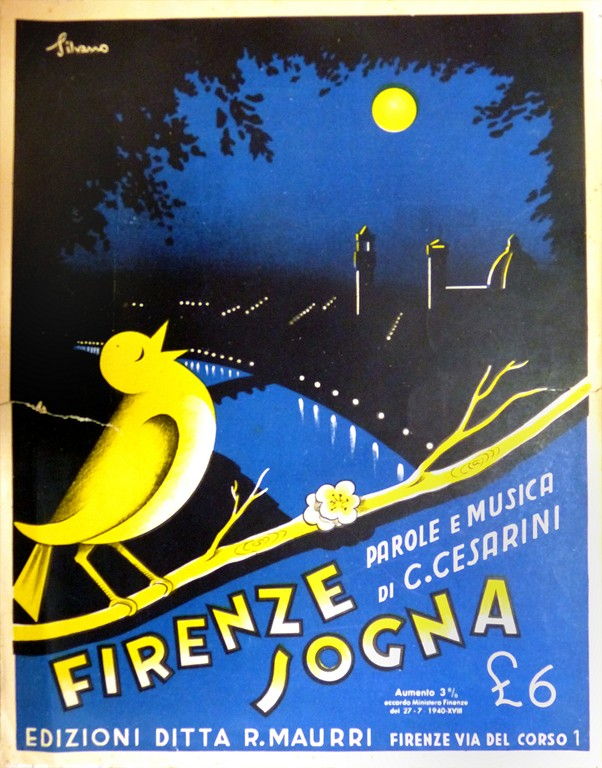 C. Cesarini, Firenze sogna, copertina dello spartito musicale, Firenze, Edizioni Ditta R. Maurri, 1941 (AS Ragusa, SAS Modica, Biblioteca Moncada, s.n.)